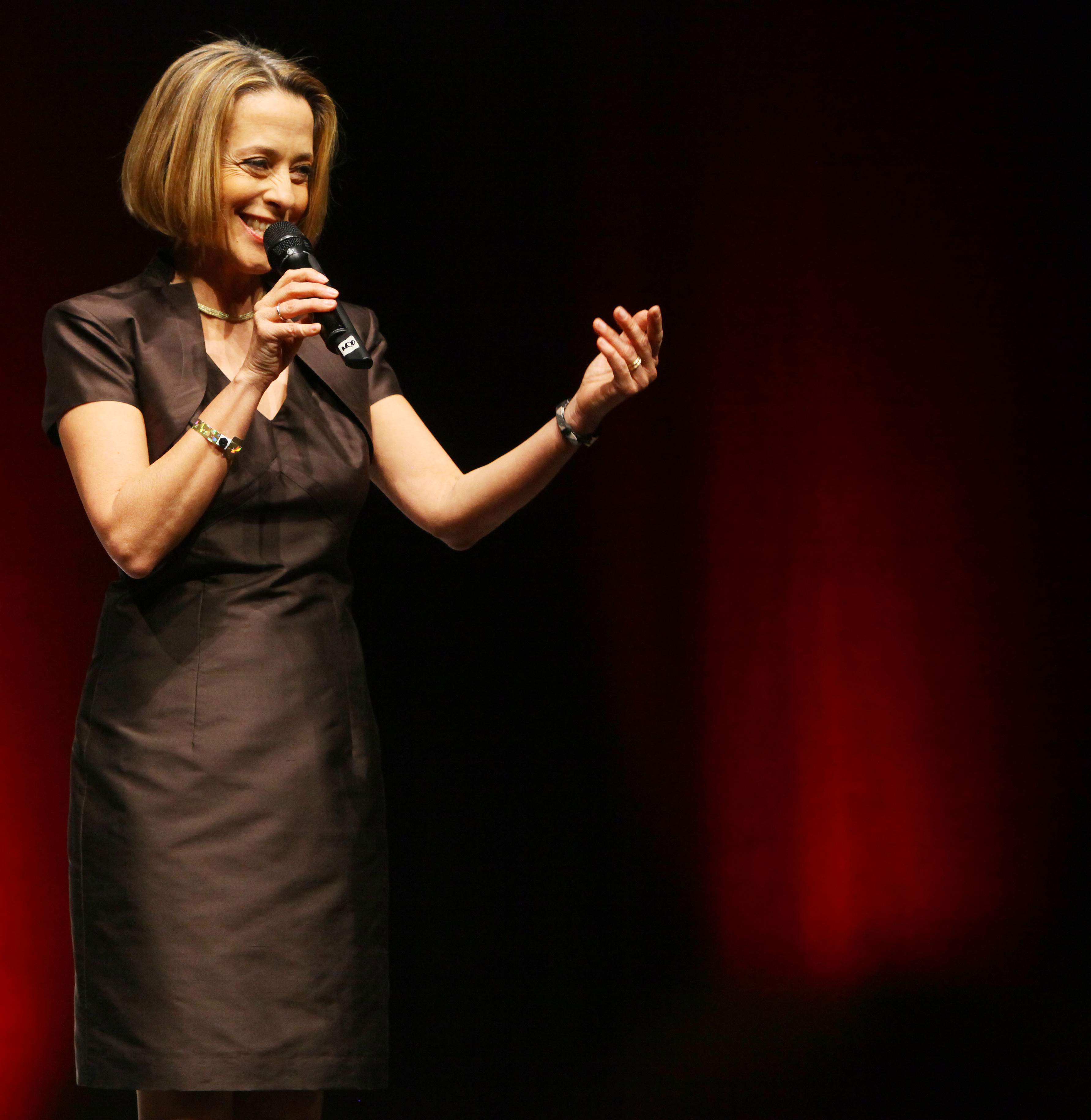 Veranstaltungsmoderatorin, Radiomoderatorin Gisela Steinhauer